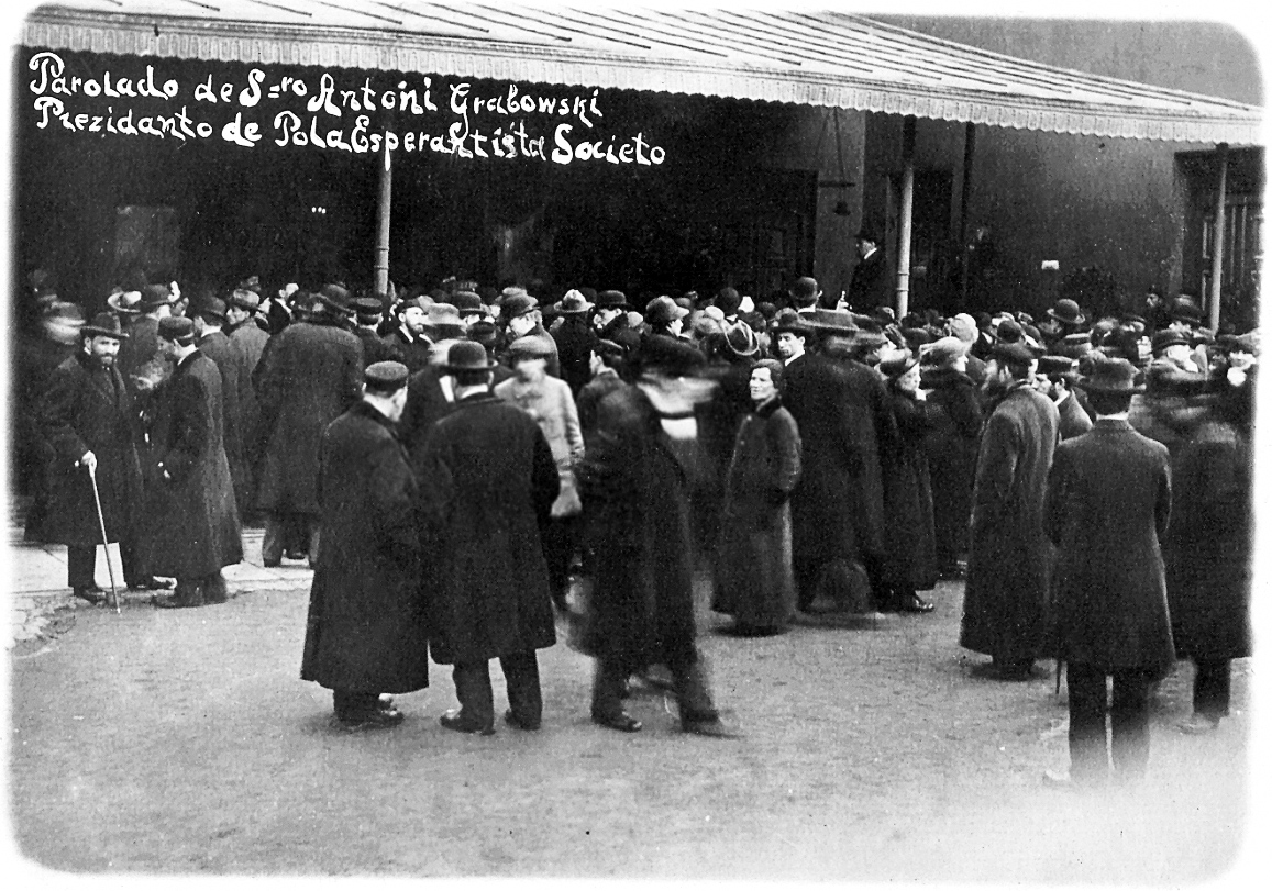 Funebro kaj entombigo de L. L. Zamenhof, Varsovio. Parolado de s-ro Antoni Grabowski, prezidanto de Pola Esperantista Societo Foto el serio de poŝtkartoj iniciatita de Adolf Oberrotman el Varsovio.